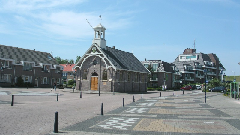 Het plein van Huisduinen Town square of Huisduinen